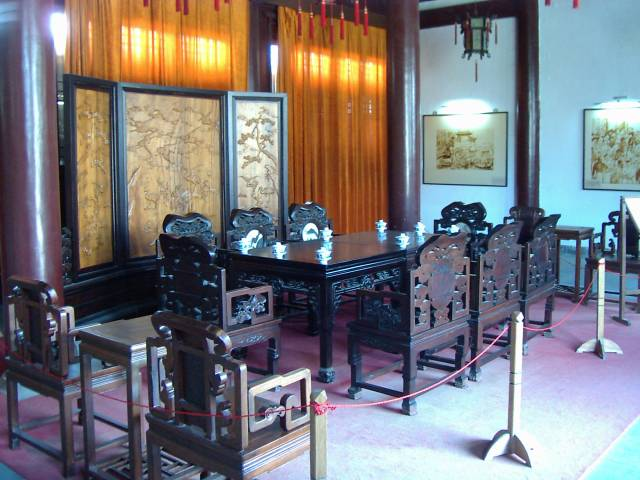 静海寺 南京条約会談場復元 2004年4月16日撮影 撮影者:権作 参照：